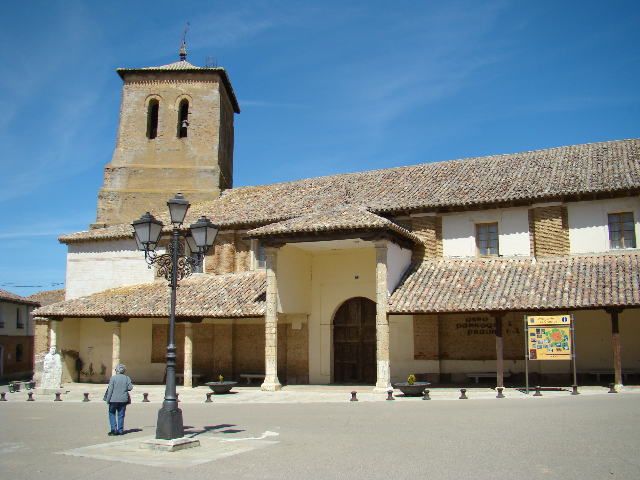 Retablo de la iglesia de San Facundo en la localidad de Cisneros, Palencia (España).